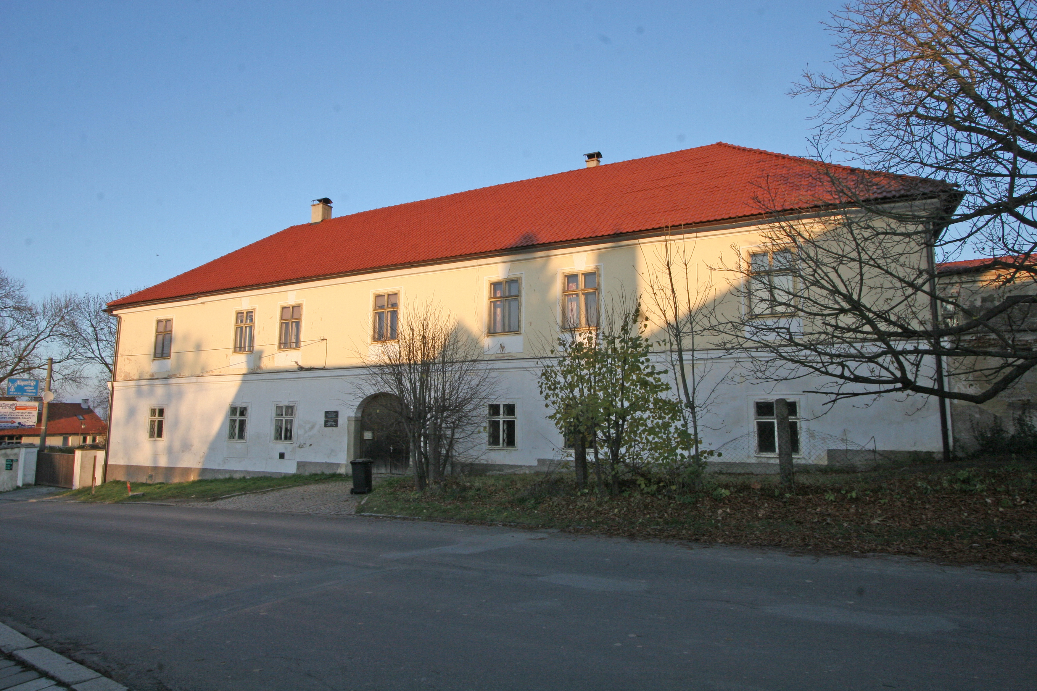 Starý a nový zámek, 5. května 2, Golčův Jeníkov